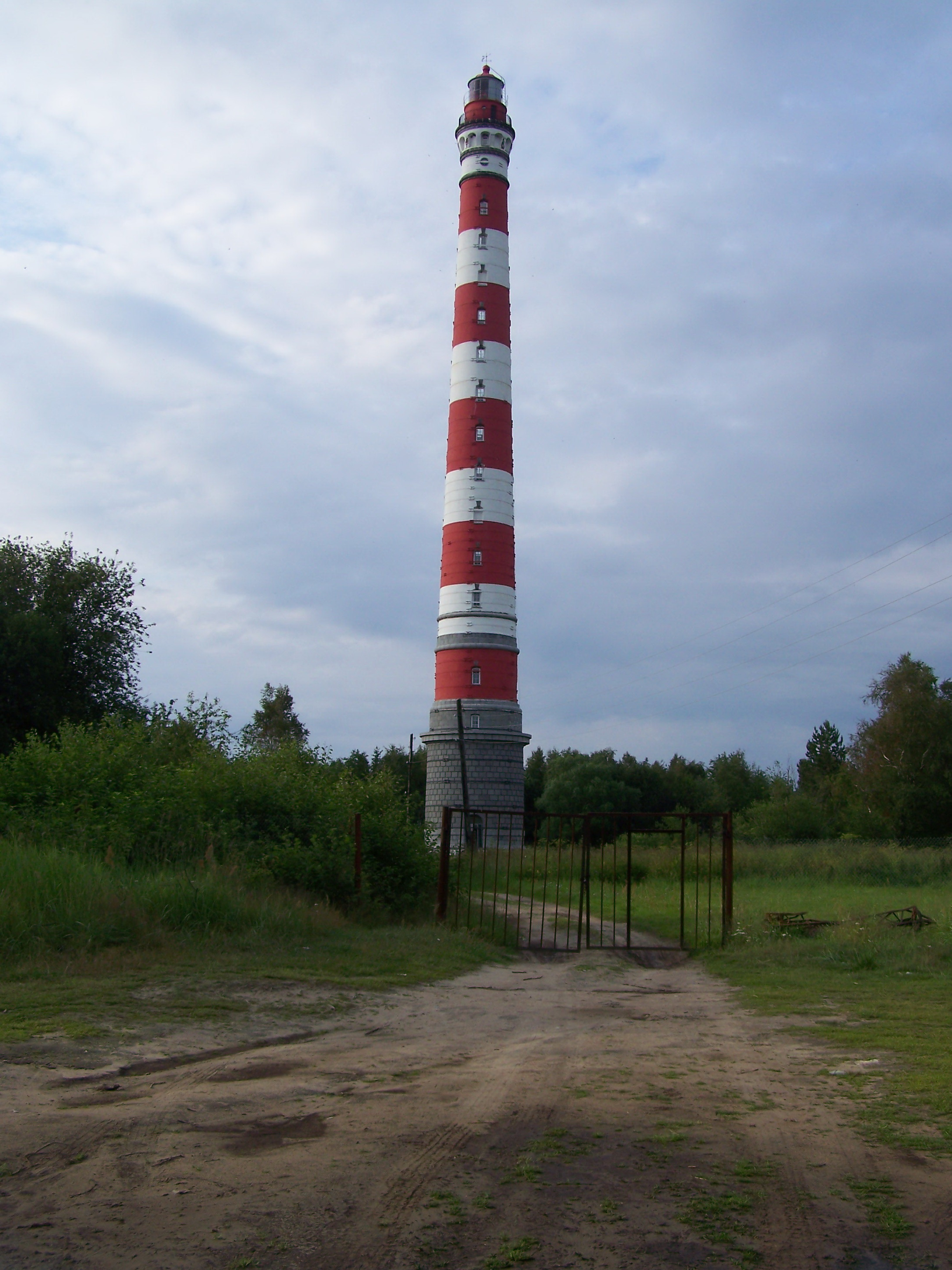 Устье реки Свирь: включает Загубский и Лодейнопольской участки (см. на сайте ООПТ России), острова Корелка, Руна, Горготуха, Олений, Лисий, безымянный в устье р. Свирь и мыс Стороженский, Волховский район, Ленинградская область This image is related to the protected area of Russia number 4710024